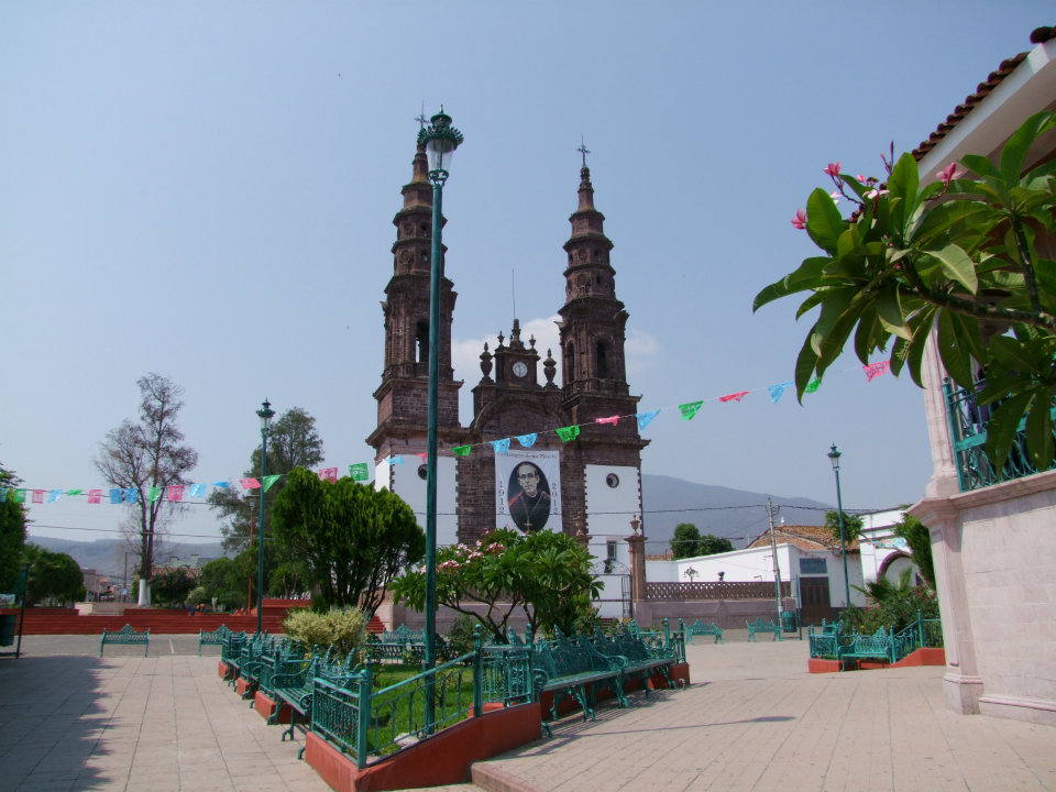 ecuandureo